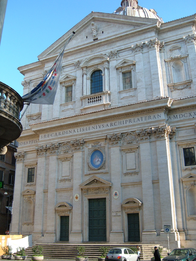 Chiesa di San Carlo ai Catinari, nel rione S. Eustachio, a Roma. Foto personale.